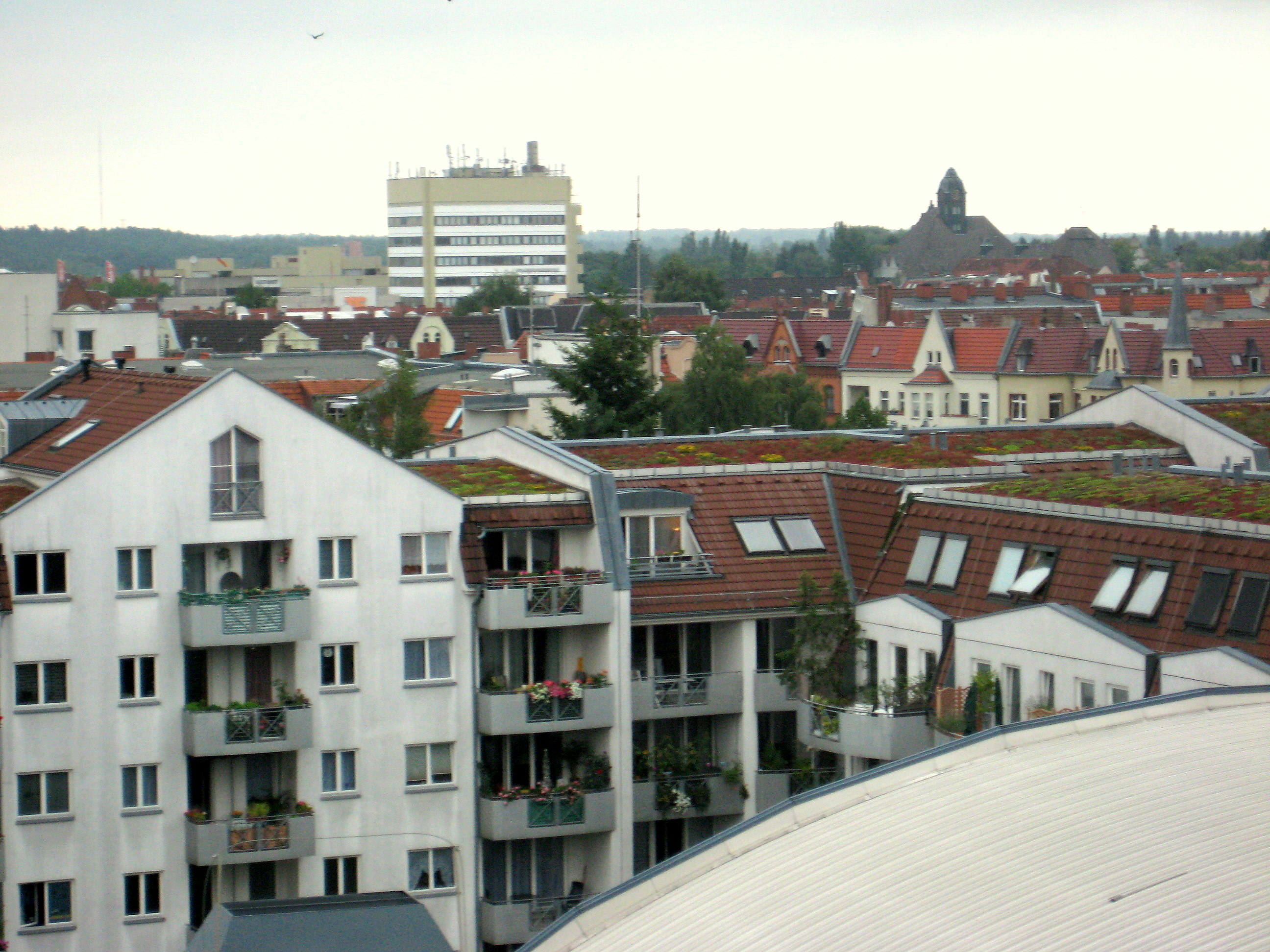 Blick über Berlin-Tegel von den Hallen am Borsigcenter; gut zu erkennen das Hochhaus an der Budde-/Gorkistraße sowie das Dach des Humboldtgymnasiums in der Hatzfeldallee